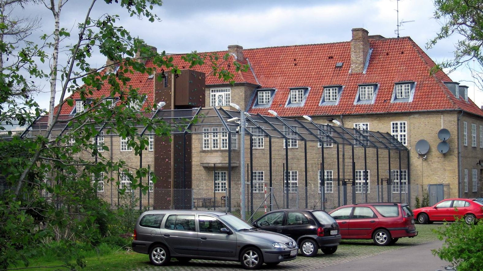 Bakkehuset / Bakkegården.